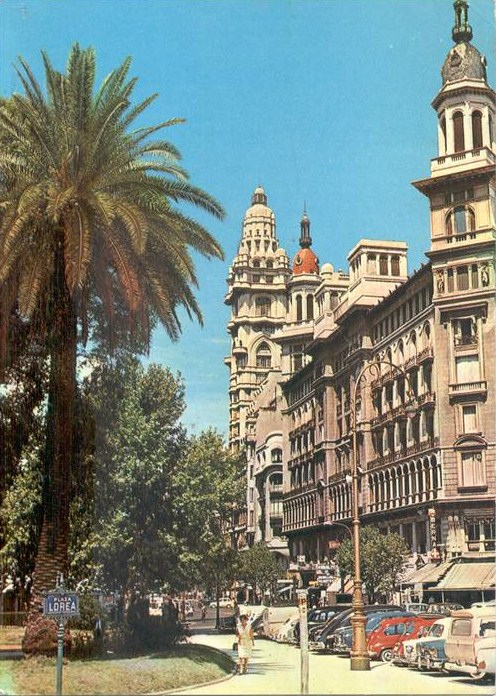 Vista de la Plaza Lorea (Buenos Aires) en primer plano, atrás a la derecha el Edificio La Inmobiliaria con una de sus cúpulas roja y la otra revestida en pizarra, seguida por el Palacio Barolo. Estacionados en la vereda de Avenida de Mayo, diversos modelos de autos de las décadas de 1950, 1960 y 1970.